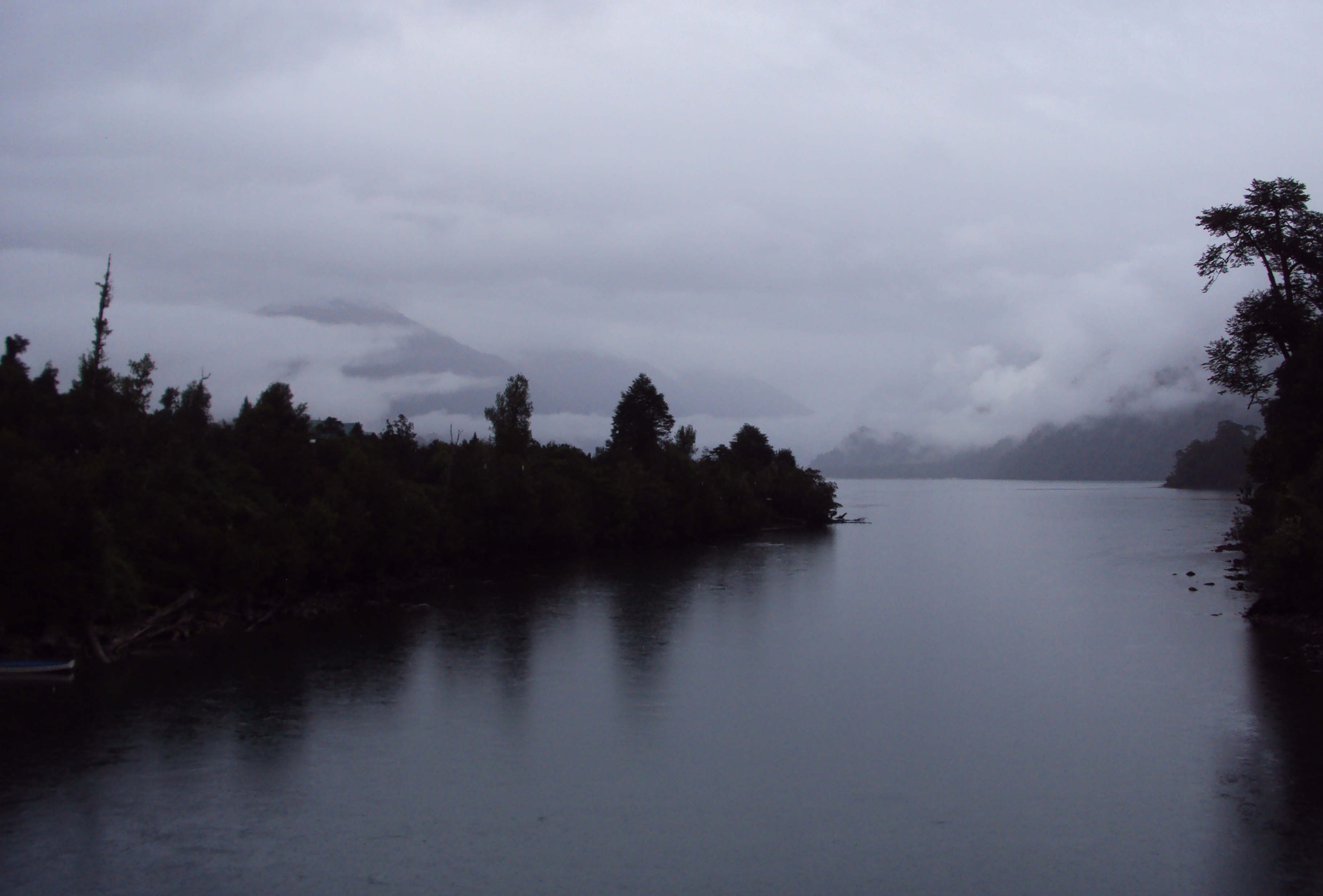 Río Rosselot en su desembocadura en el lago del mismo nombre, cerca de La Junta, comuna de Cisnes, región de Aysén, Chile.